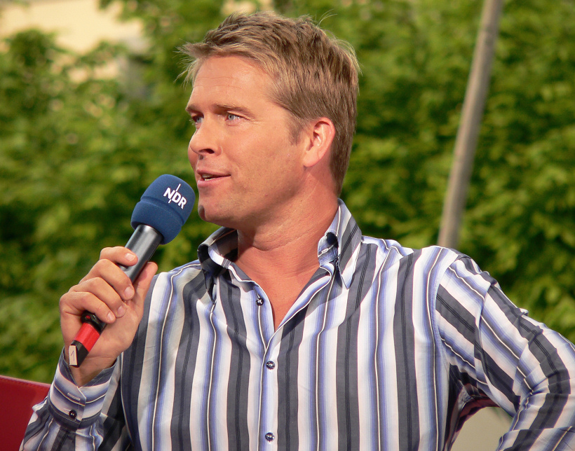 Hinnerk Baumgarten